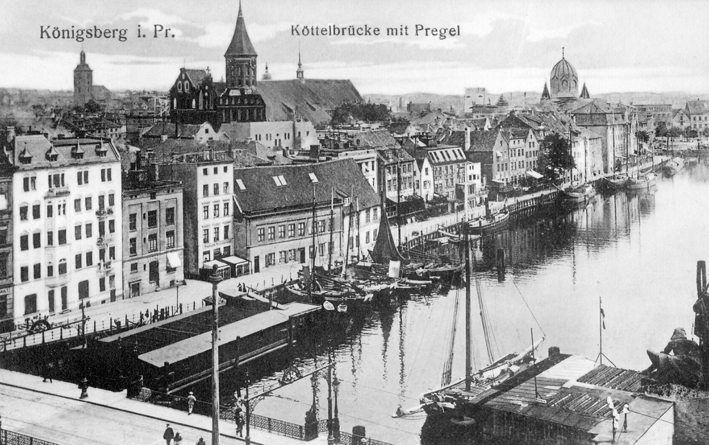 Köttelbrücke in Königsberg